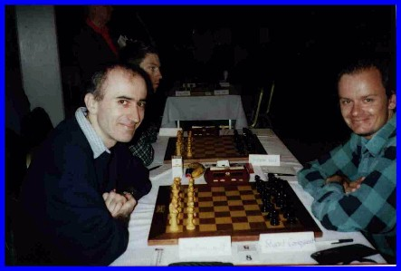 Jon Levitt en Stuart Conquest Categorie:Afbeelding schaker